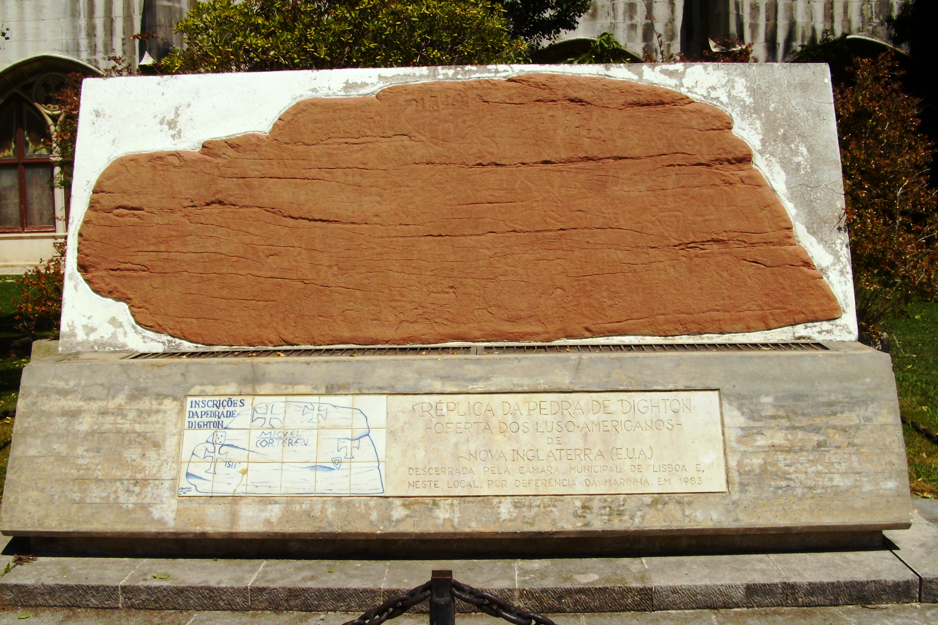 Museu de Marinha de Lisboa, Portugal. A inscrição reza: "Réplica da Pedra de Dighton / - Oferta dos Luso-Americanos - / de / Nova Inglaterra (E.U.A.) / descerrada pela Câmara Municipal de Lisboa e, / este local, por deferência da Marinha, em 1983".